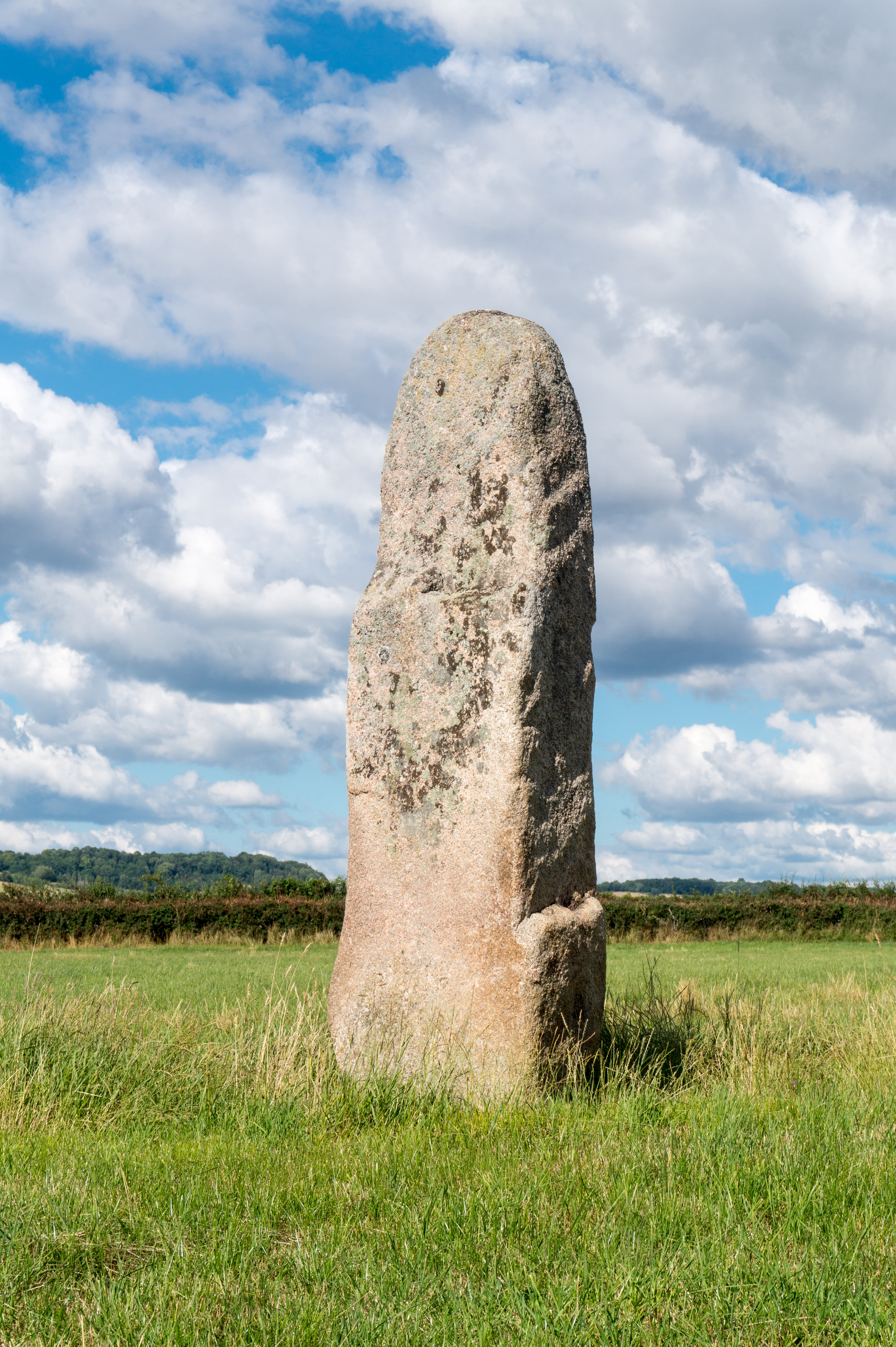 Menhir Sainte-Christine, aussi appelé Grande Borne